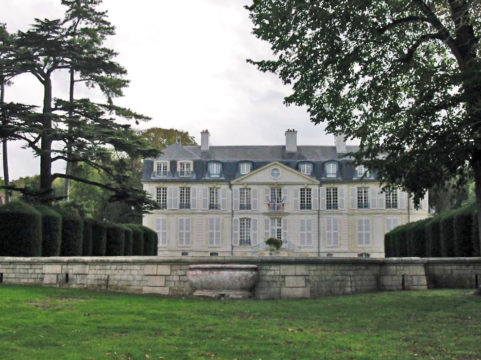 Flins-sur-Seine (Yvelines), la mairie Photo JH Mora, novembre 2005 Licensing Catégorie:Image de Flins-sur-Seine Flins-sur-Seine